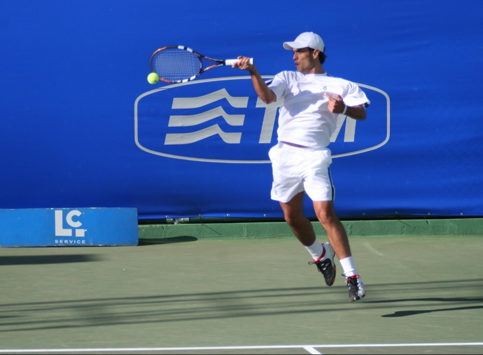 Paulo Camargo Tenista